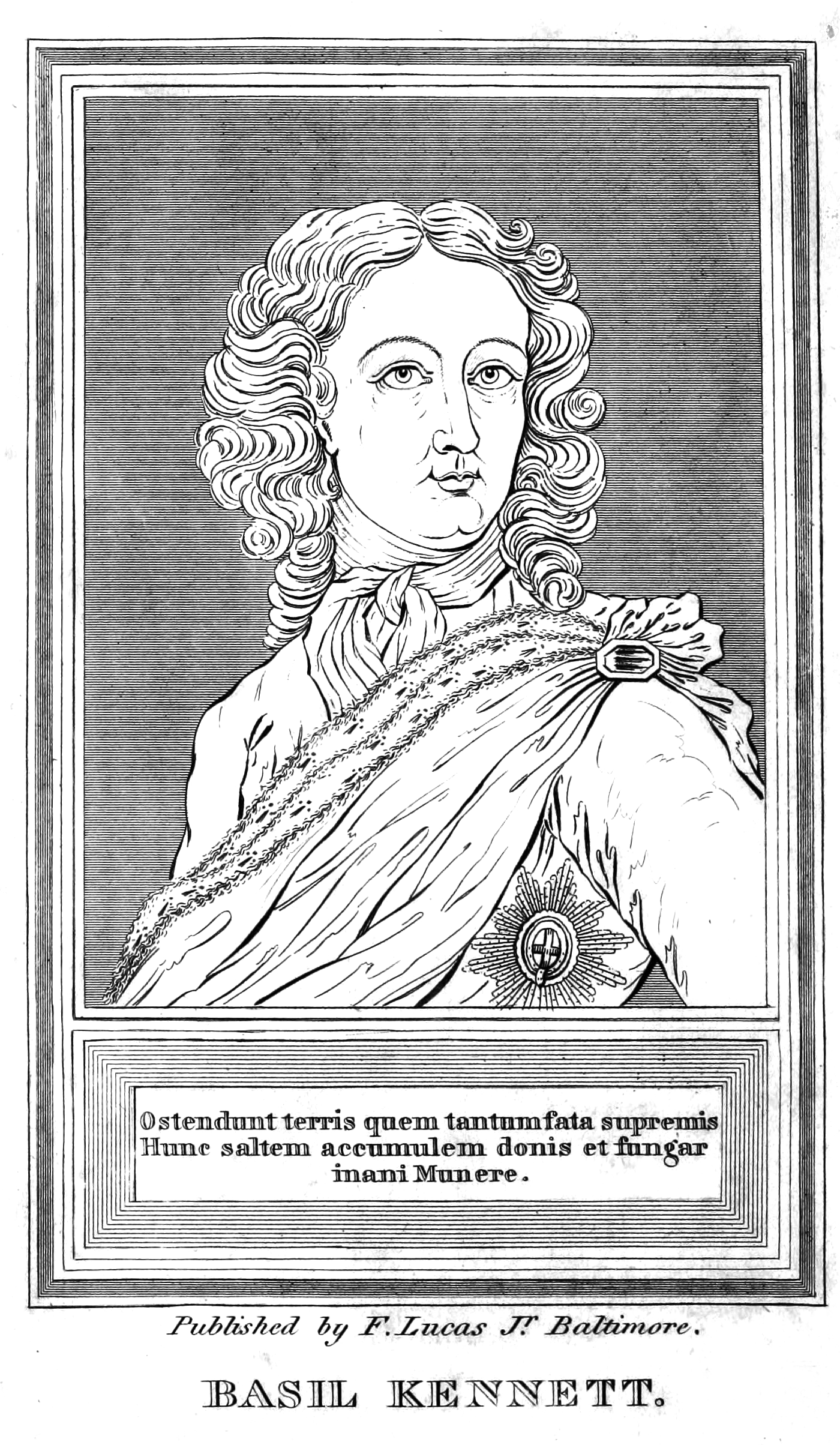 Basil Kennett (1674–1715)